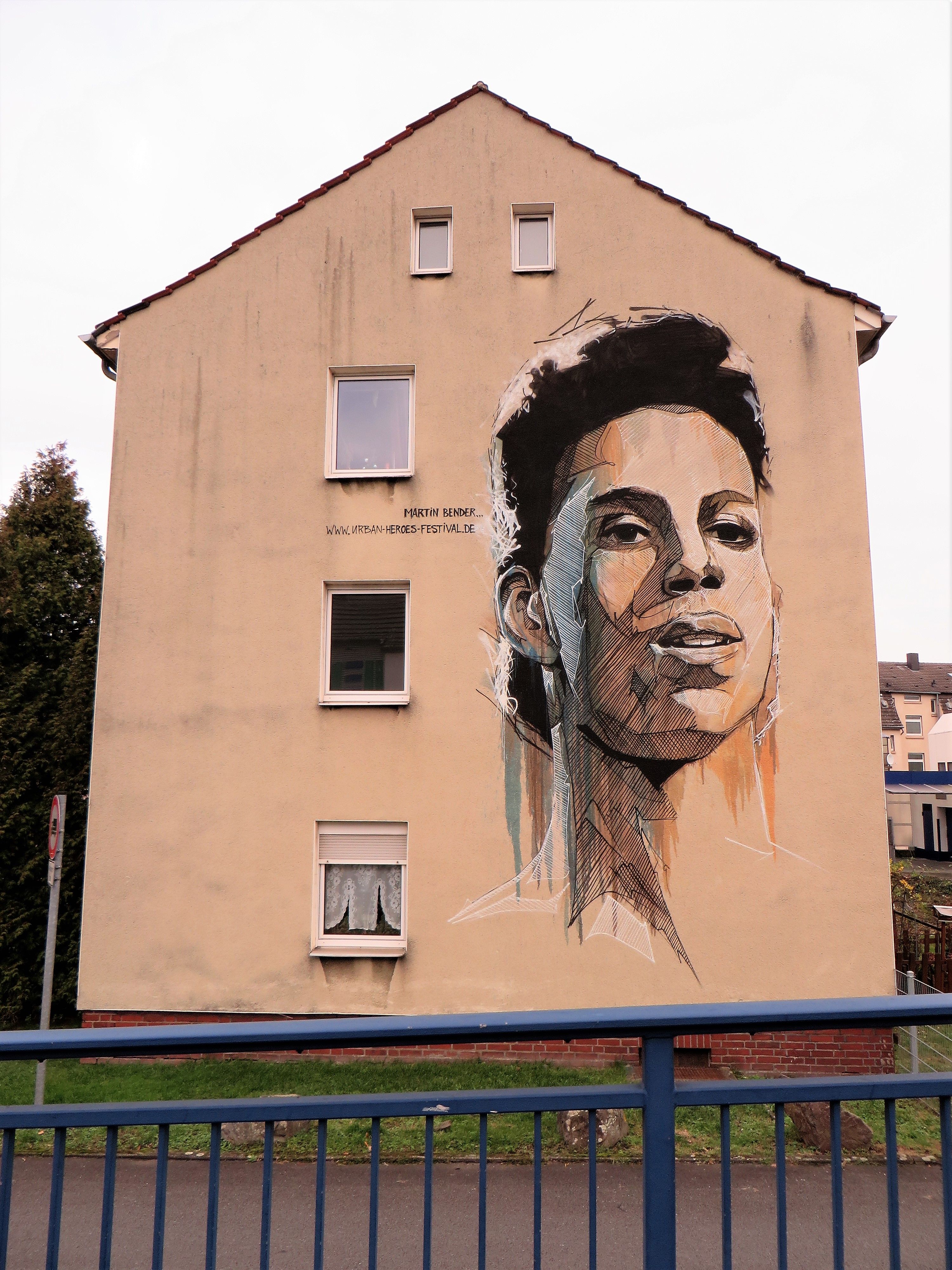 Freiluftgalerie „Urban Heroes Art-Festival“ in Hagen-Eckesey. Streetart-Objekt: Schillerstraße 2. Künstler: Martin Bender, Hagen. Titel: „Prince“.